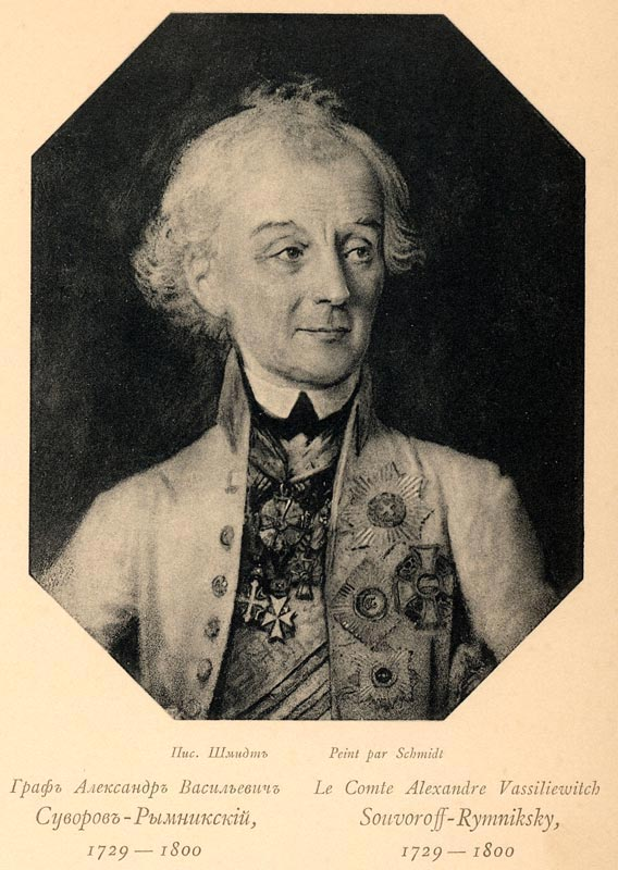 Graf Aleksandr Vasil'evich Suvorov-Rymnikskii